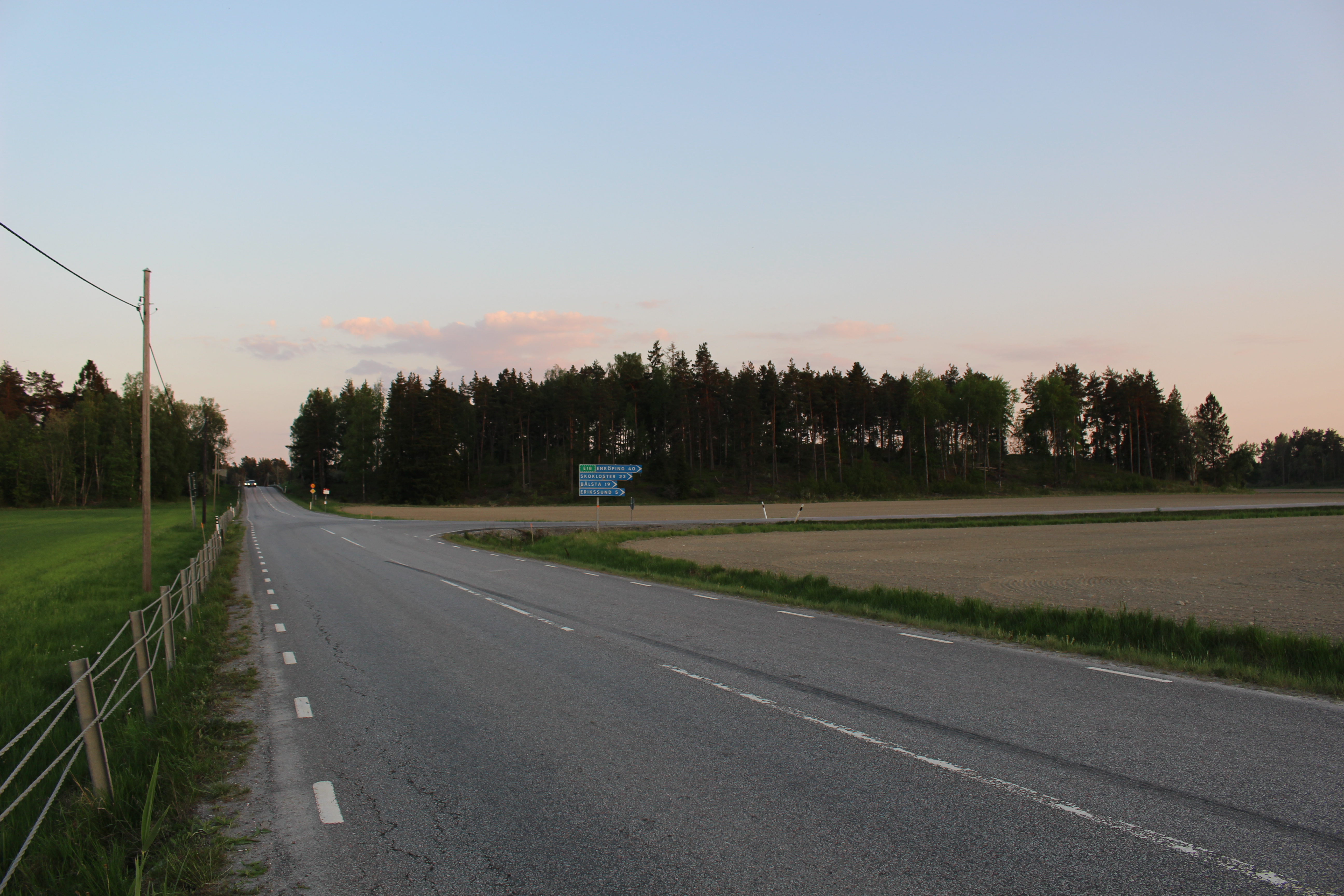 Länsväg 263 vid Österby där den gör en sväng.